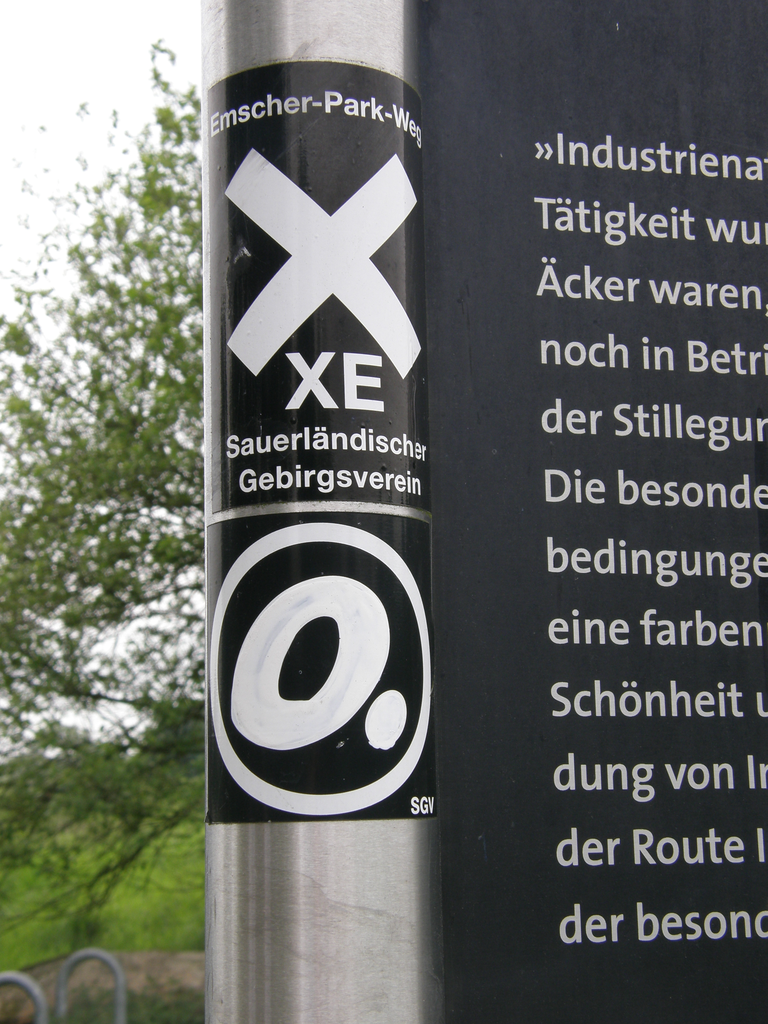 An dem linken Pfeiler eines Infoschilds der Route der Industriekultur - Themenroute 24: Industrienatur - über die Brache Vondern wurden zwei Wanderwegweiser angebracht. (Oberhausen, Nordrhein-Westfalen, Deutschland)